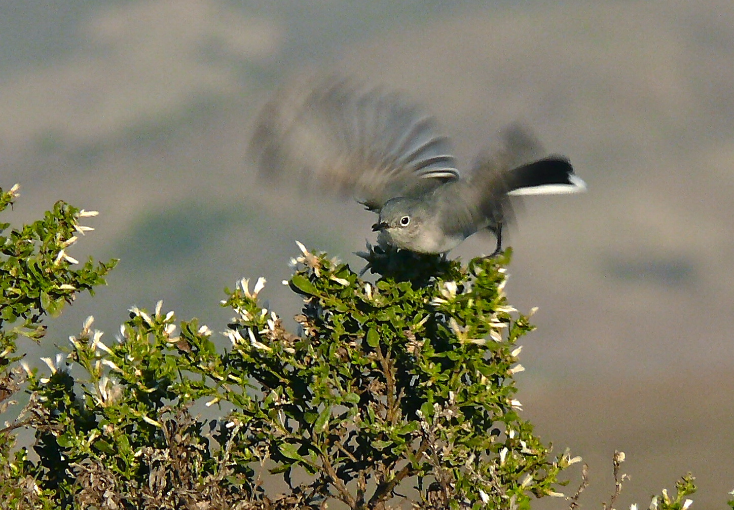 Polioptila caerulea, San Simeon, California